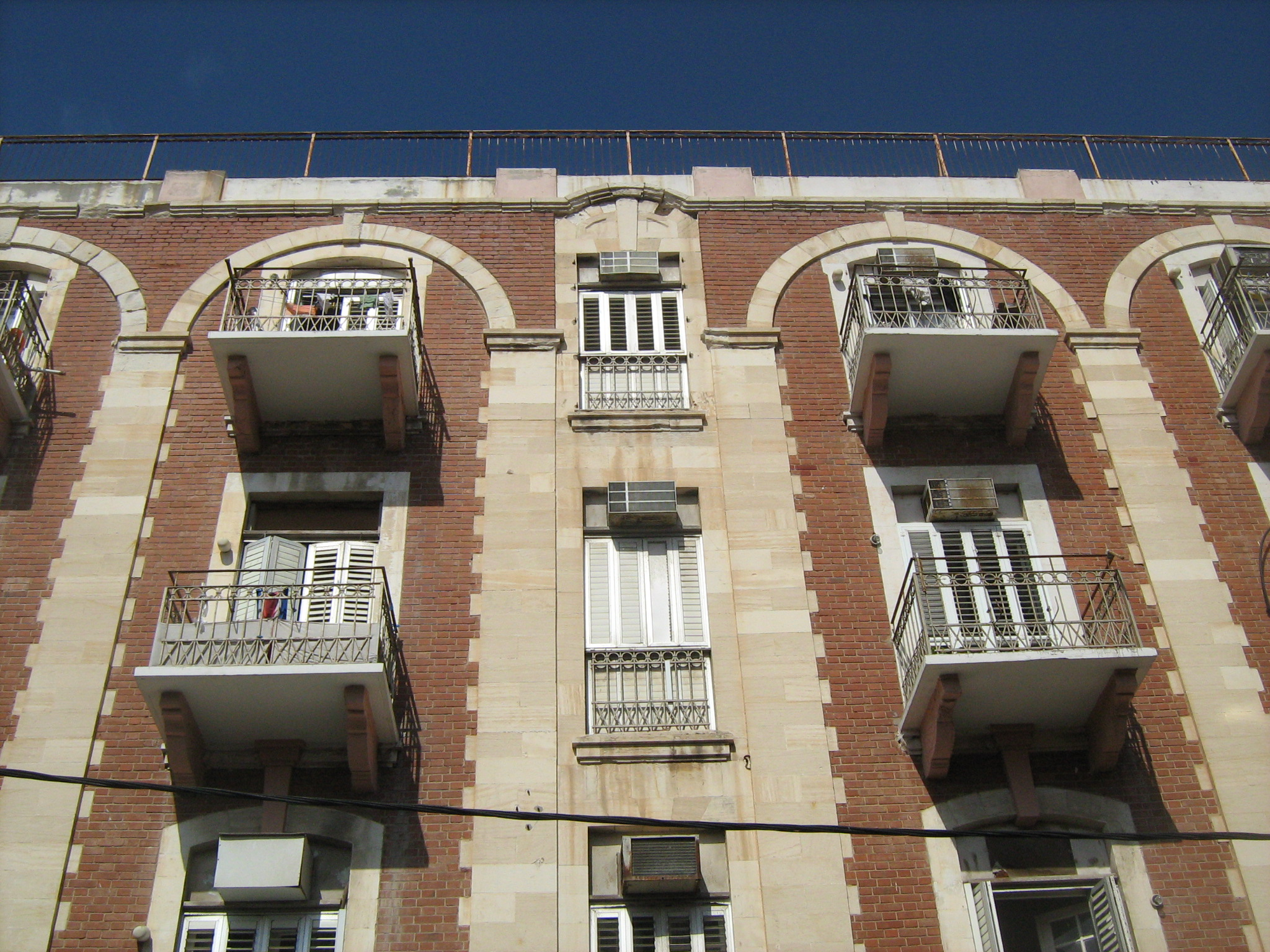 בית סורסוק ביפו